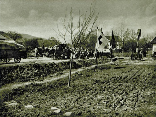 Divisionssanitätsanstalt Borosnya an der Feldbahn Varannö–Kelcse (Österreich-Ungarn in Waffen, Mappe 1, In den Karpathen, Blatt 30)